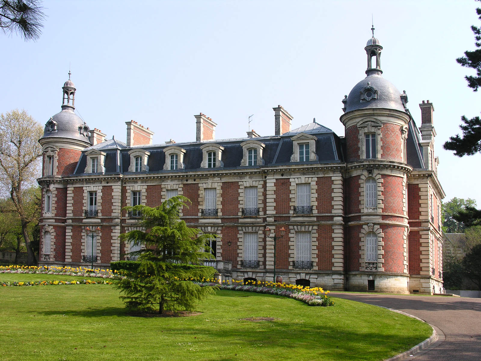 Château de Trousse-Barrière, Briare, Loiret, France.